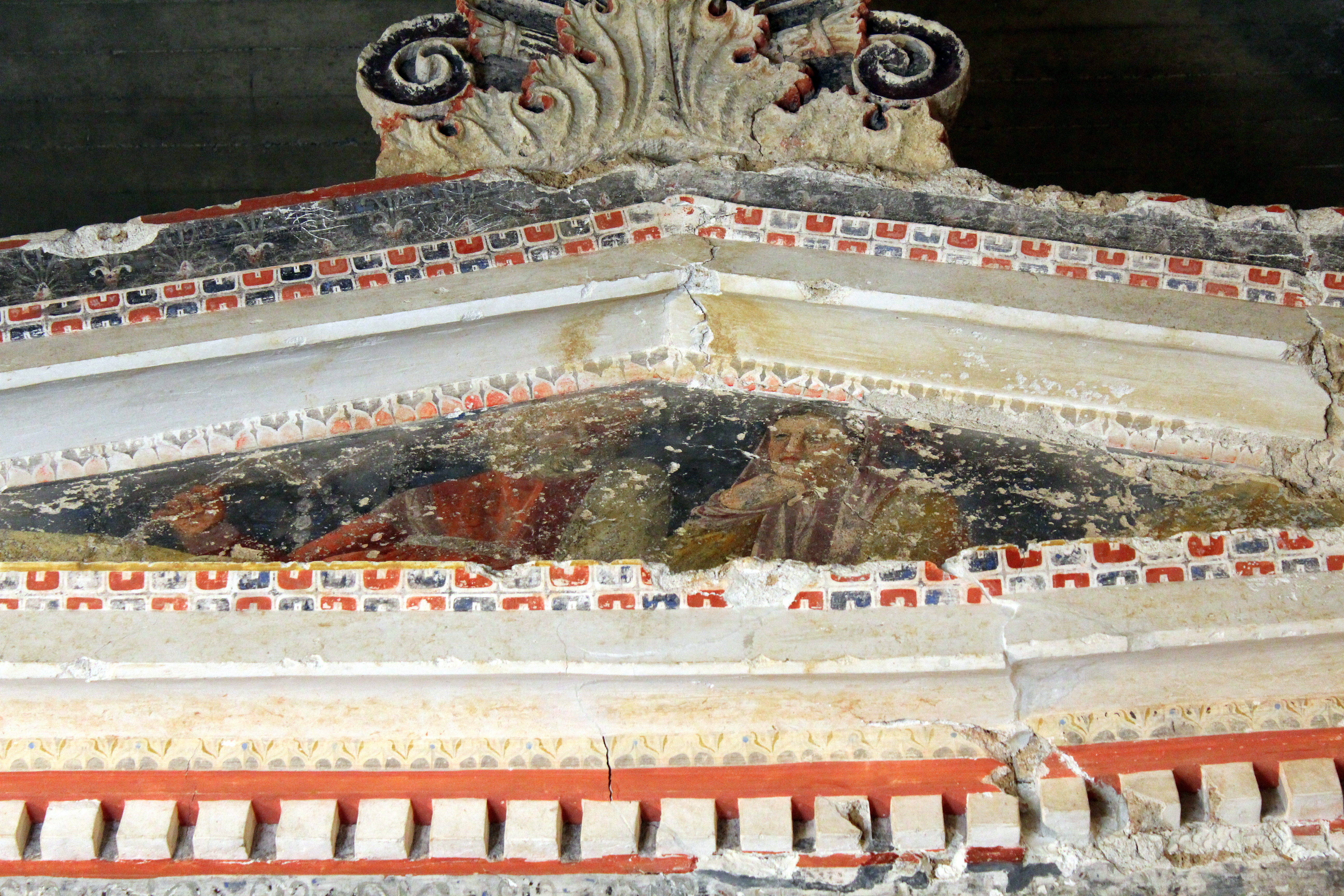 Μακεδονικός τάφος των Ανθεμίων«Μακεδονικός τάφος των Ανθεμίων»